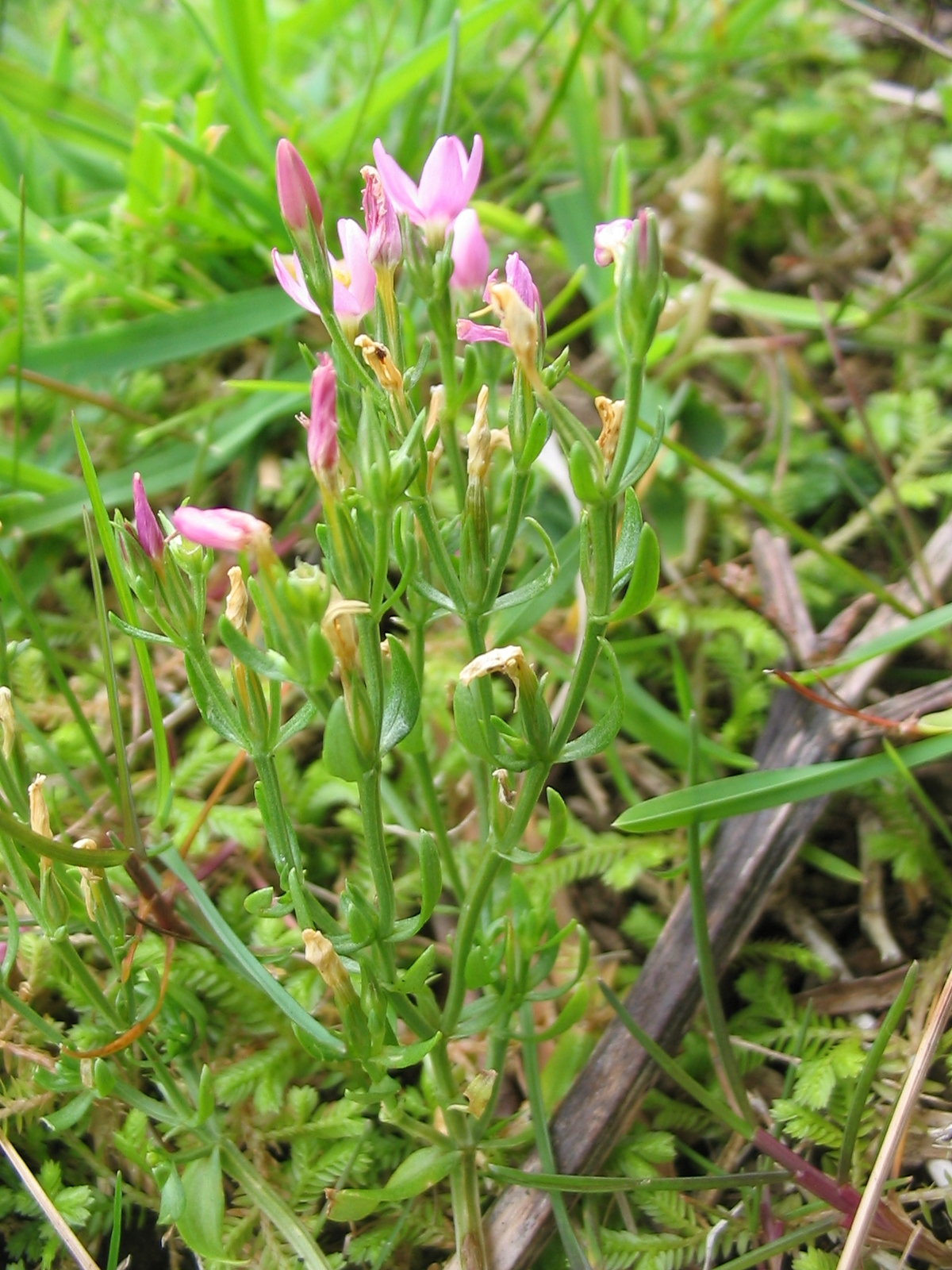 Kleines Tausendgüldenkraut (Centaurium pulchellum) - Habitus